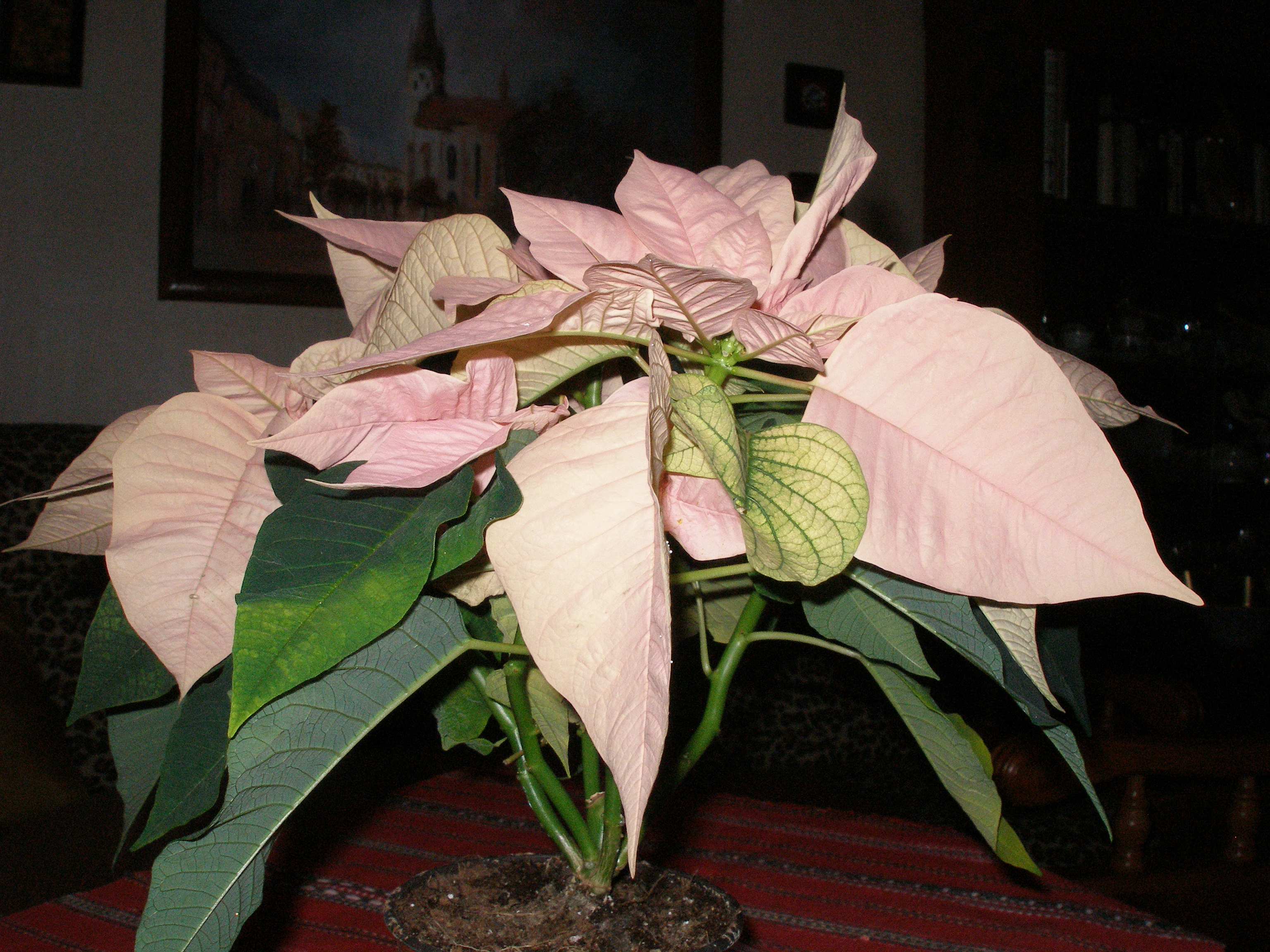 Euphorbia pulcherrima